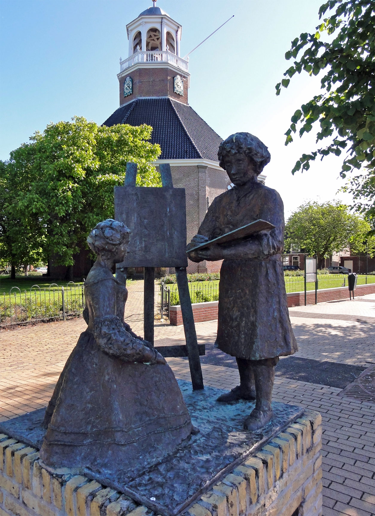 Standbeeld van Rembrandt van Rijn en Saskia van Uylenburgh voor de kerk van Sint-Annaparochie, waar zij op 22 juni 1634 trouwden. De kerk waar zij toen trouwden is naderhand afgebroken kerk en vervangen door de huidige Van Harenskerk; het standbeeld is gemaakt door Suze Boschma-Berkhout